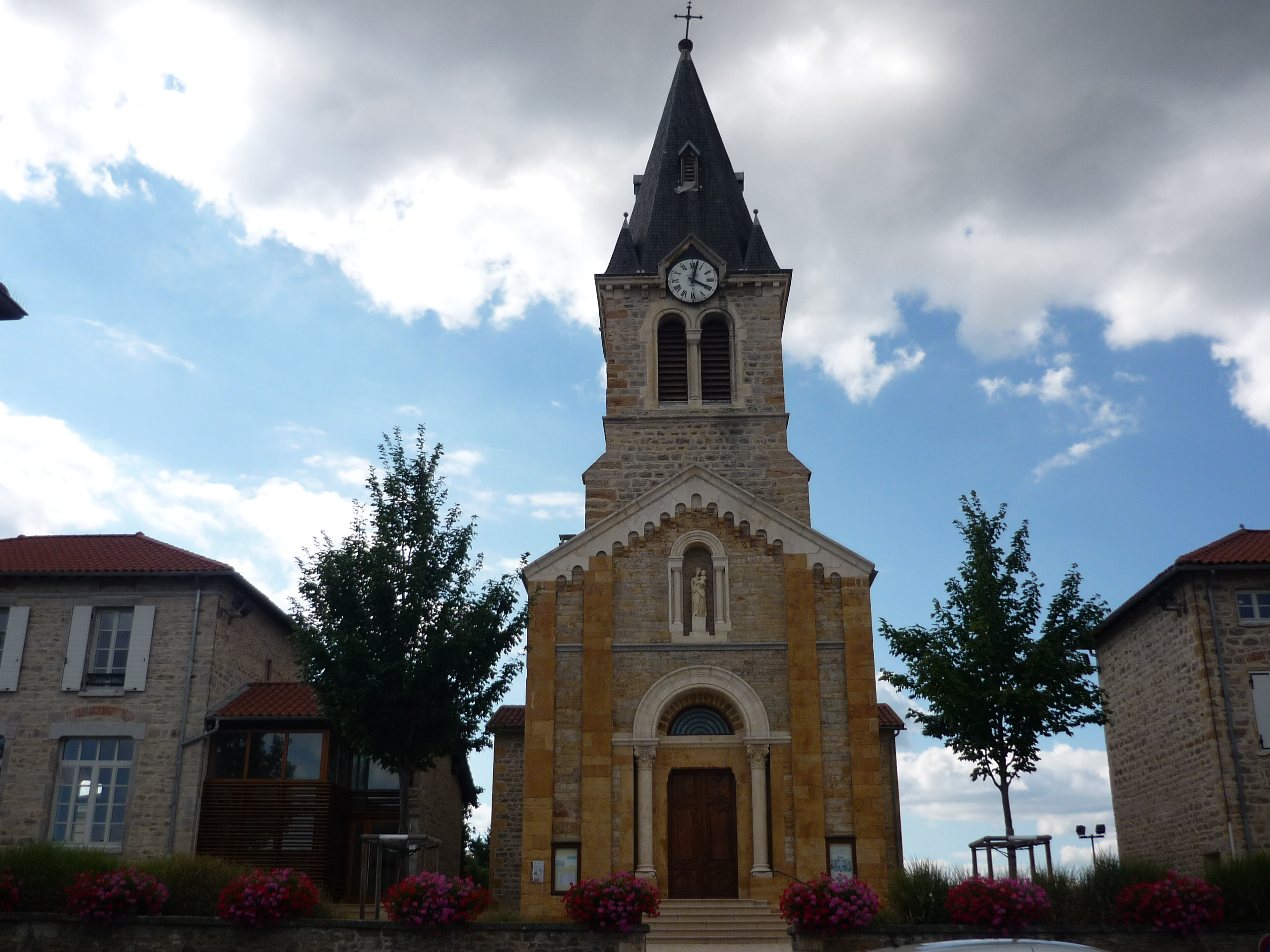 Église de Dommartin, dans le département du Rhône.